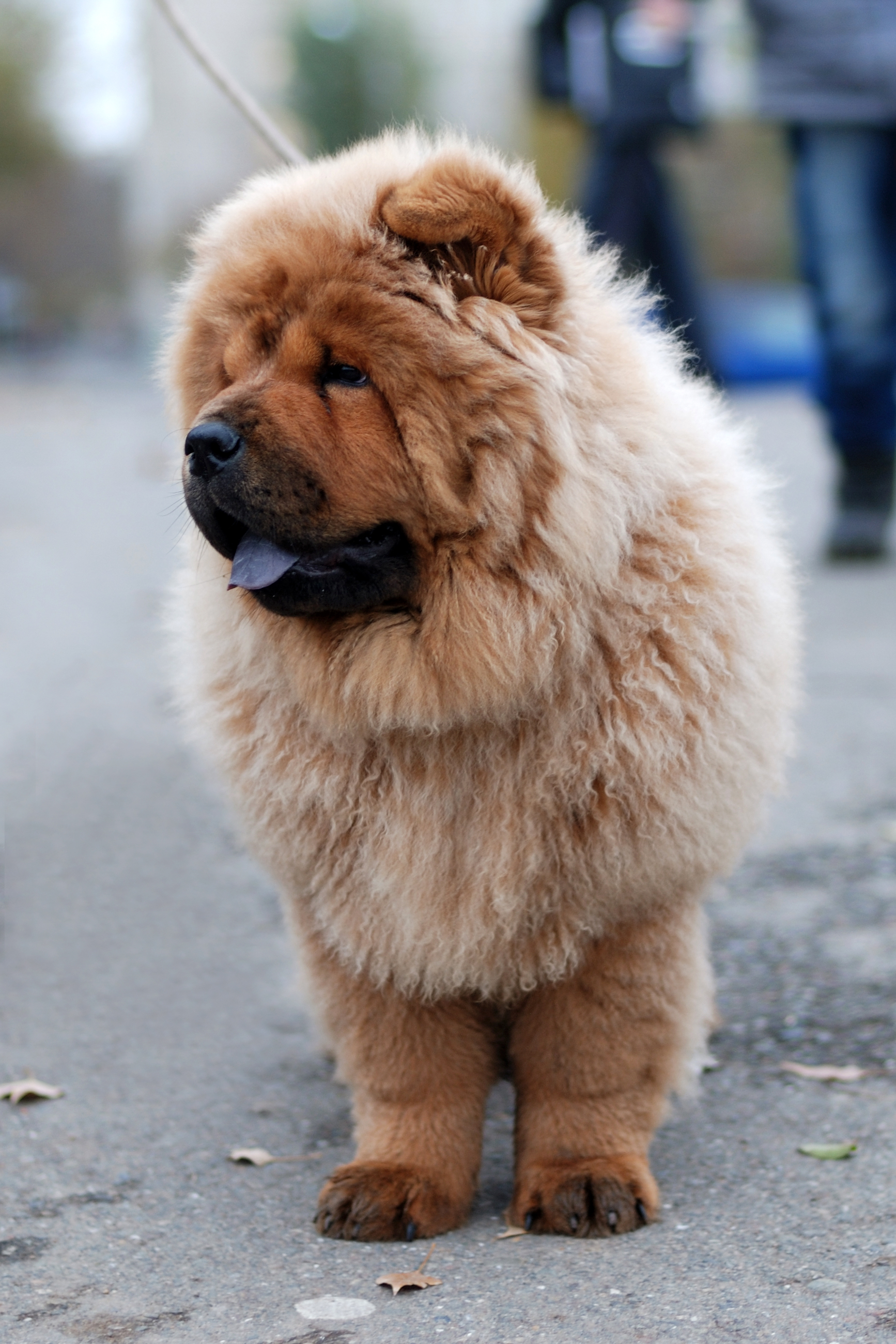 Chow Chow dog